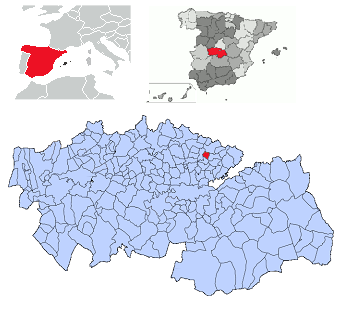 Yuncos en la provincia de Toledo